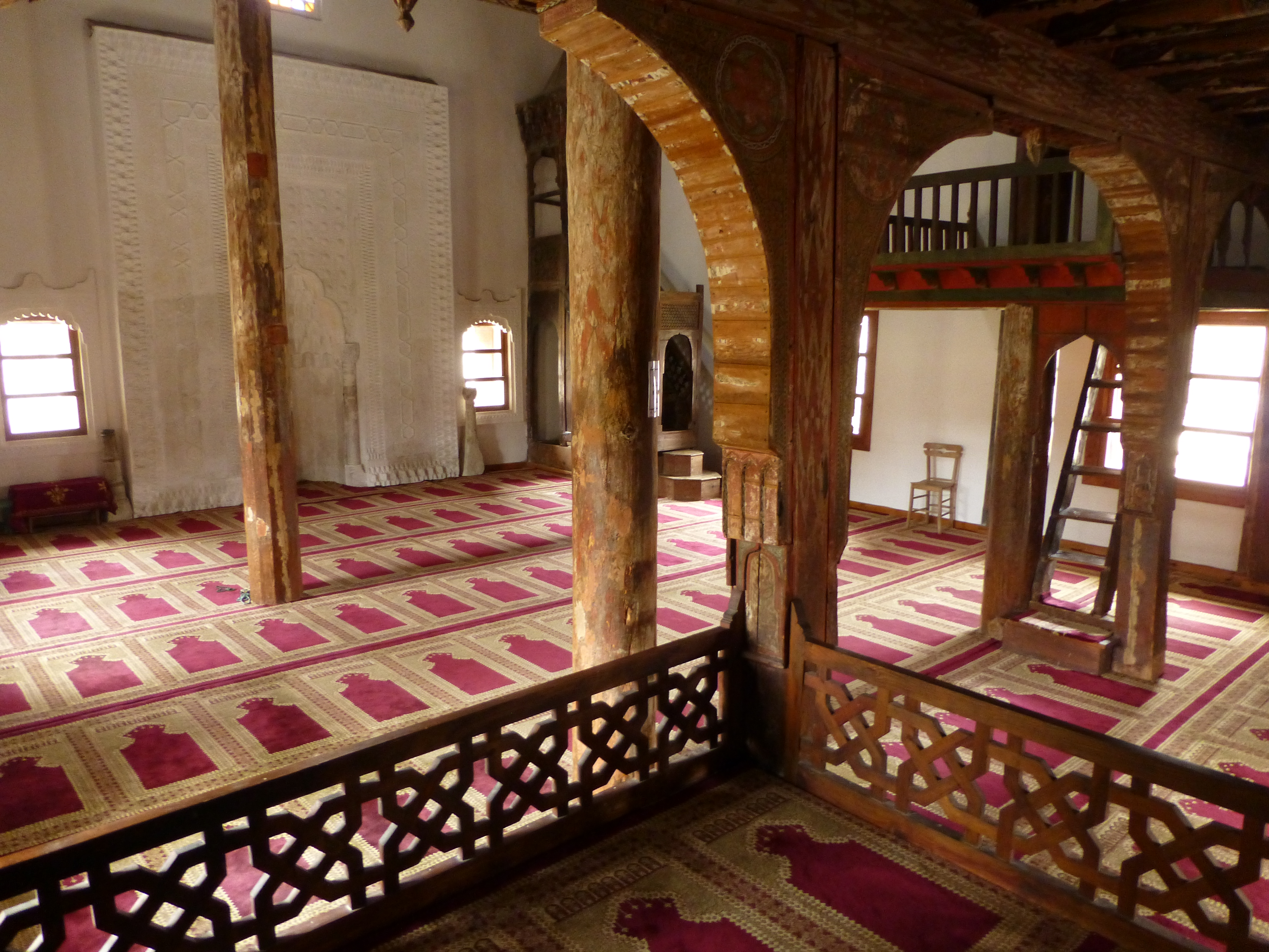 Kastamonu Kasaba köyü, Mahmutbey Camii, Çivisiz camii